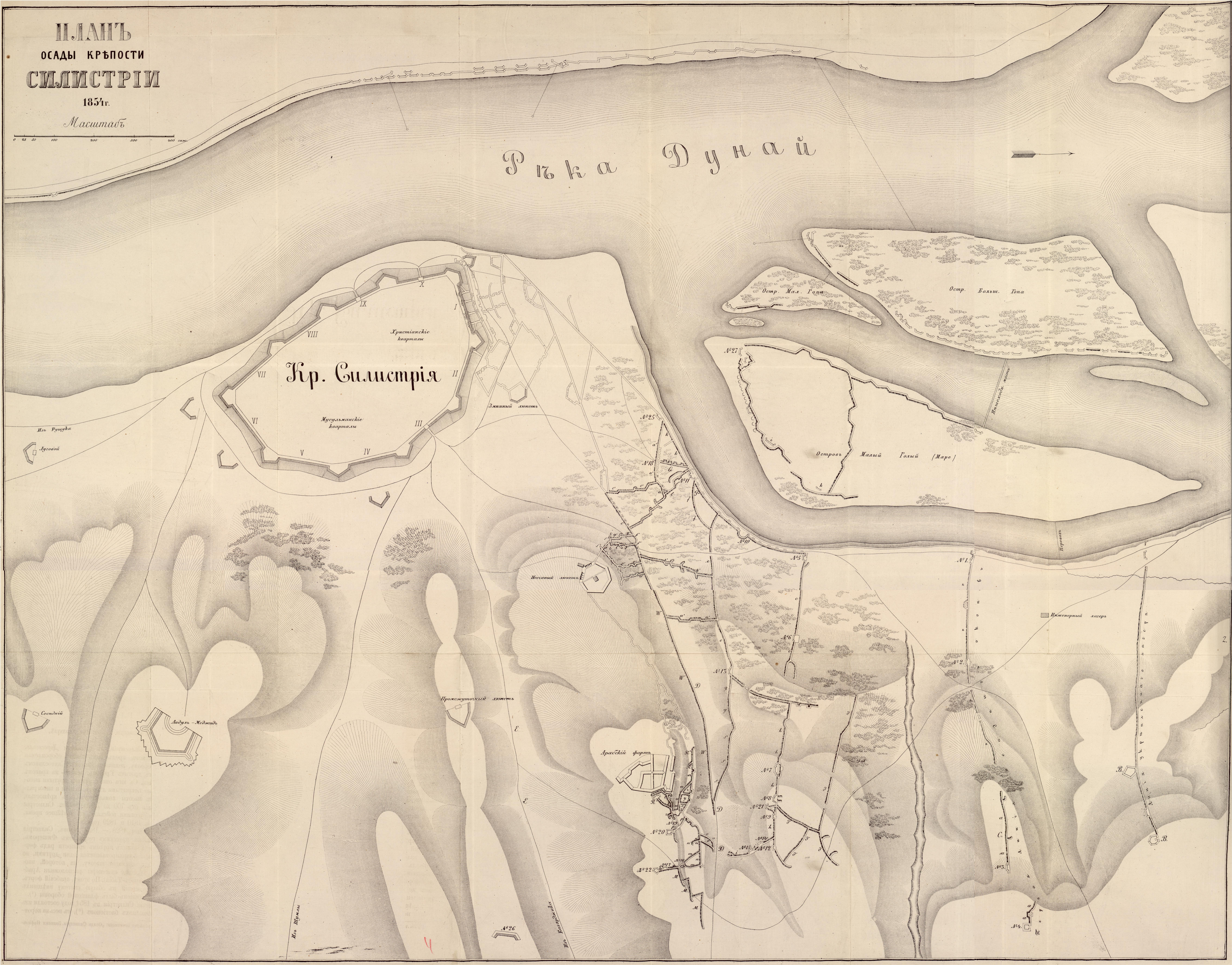 из книги: Богданович Модест Иванович Восточная война 1853-1856 гг.